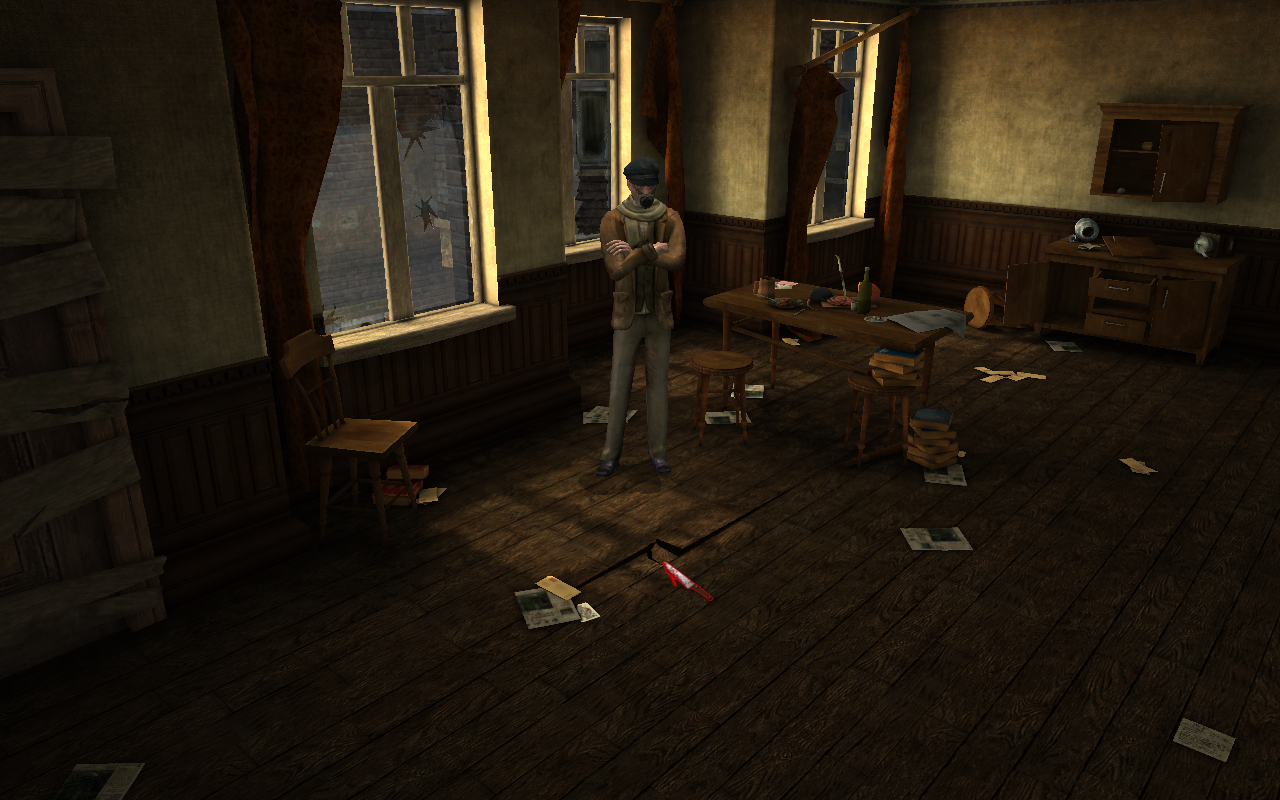 Capture d'écran du jeu Sherlock Holmes contre Jack l'Éventreur. Capture réalisée dans la planque de "Bluto", à Whitechapel. Le curseur pointant sur une latte du plancher décollée est un couteau, c'est-à-dire qu'aucune interaction n'est possible : l'énigme du médaillon qui se trouvait à cet endroit dans la version bêta a été déplacée.